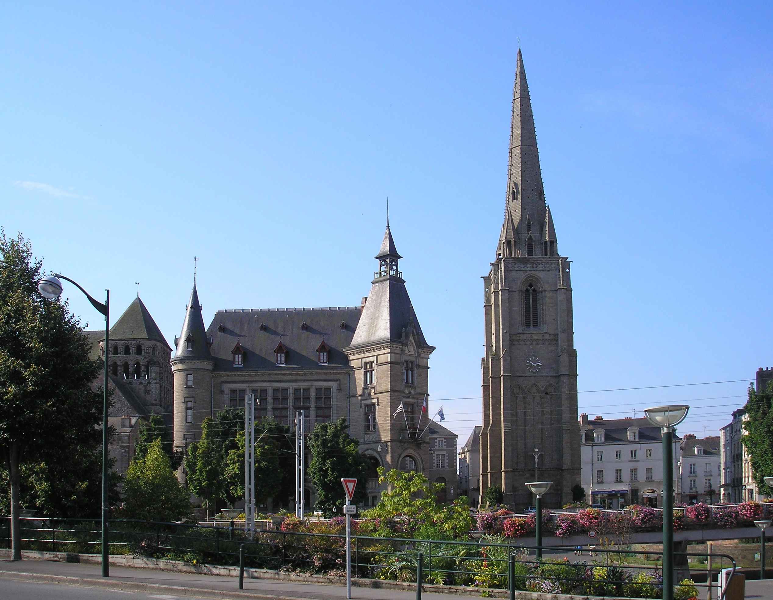 Redon (Bretagne, France). La mairie et la tour de l'abbaye Saint-Sauveur.